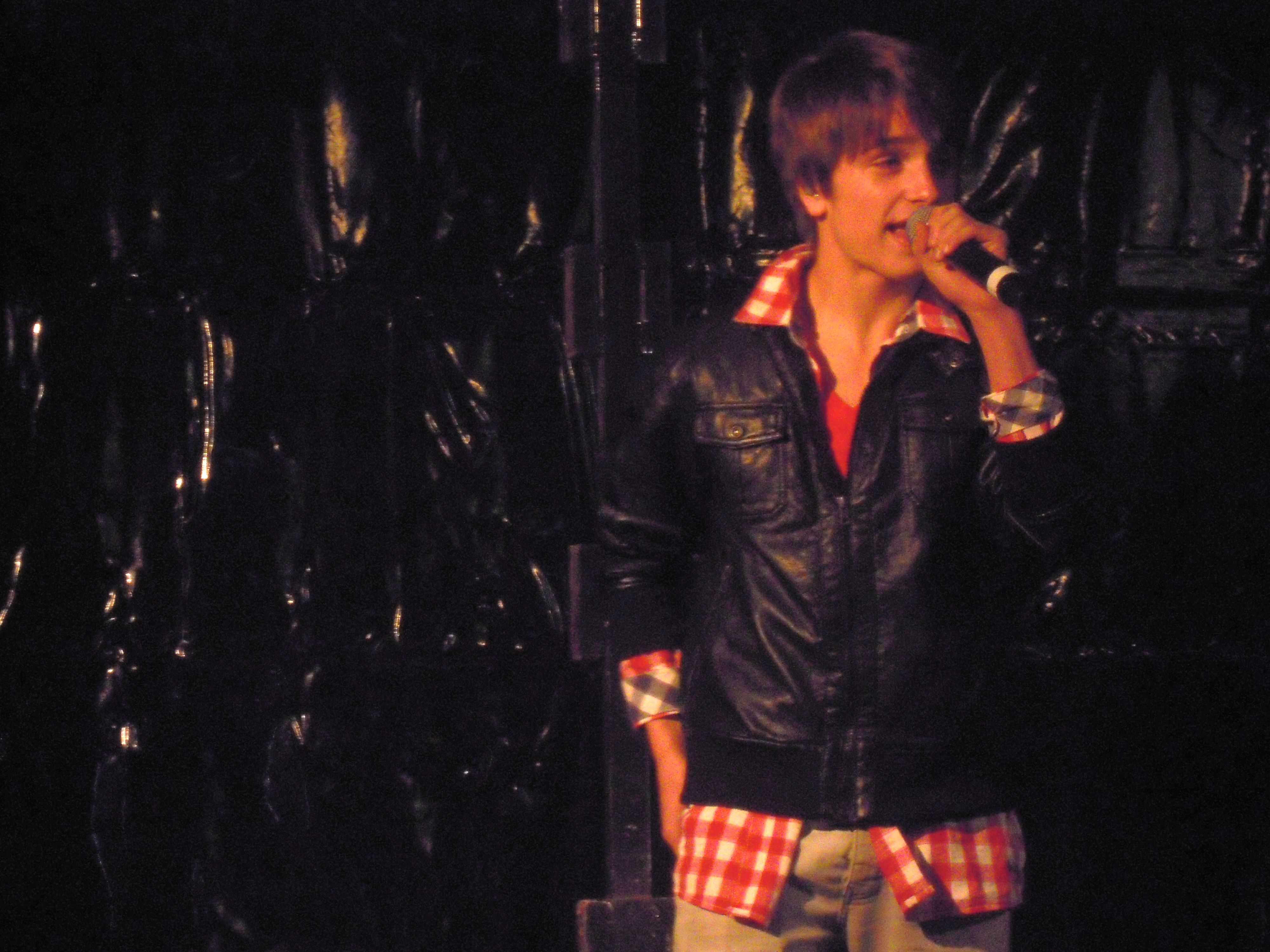 Ralf Mackenbach bij de opening van het Bigshops Parkboulevard winkelcentrum in Rotterdam Delfshaven. Vlak nadat deze foto werd genomen brak er brand uit op het dak van het winkelcentrum (zie deze categorie). Ralf kon daarom slechts twee liedjes zingen.